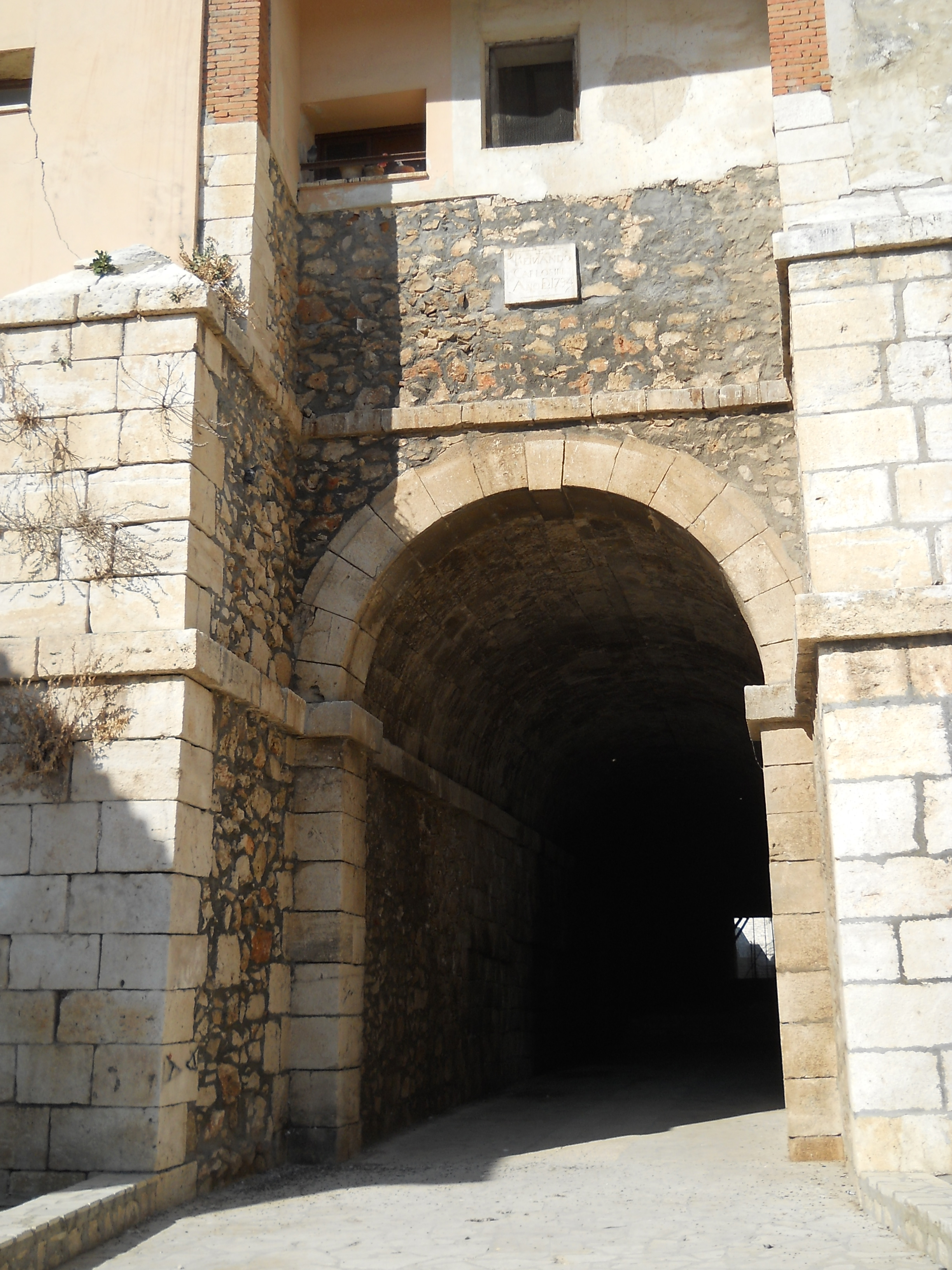 Arco de Zacatín, Colmenar de Oreja, Madrid, España